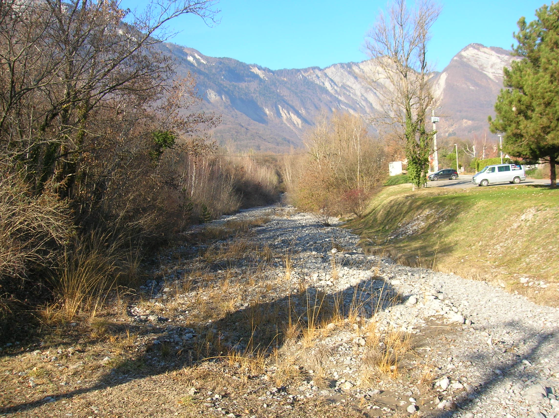 Torrent du Manival, à coté du Mémorial Doyen Gosse. Saint-Ismier, Isère, Rhone-Alpes, France.